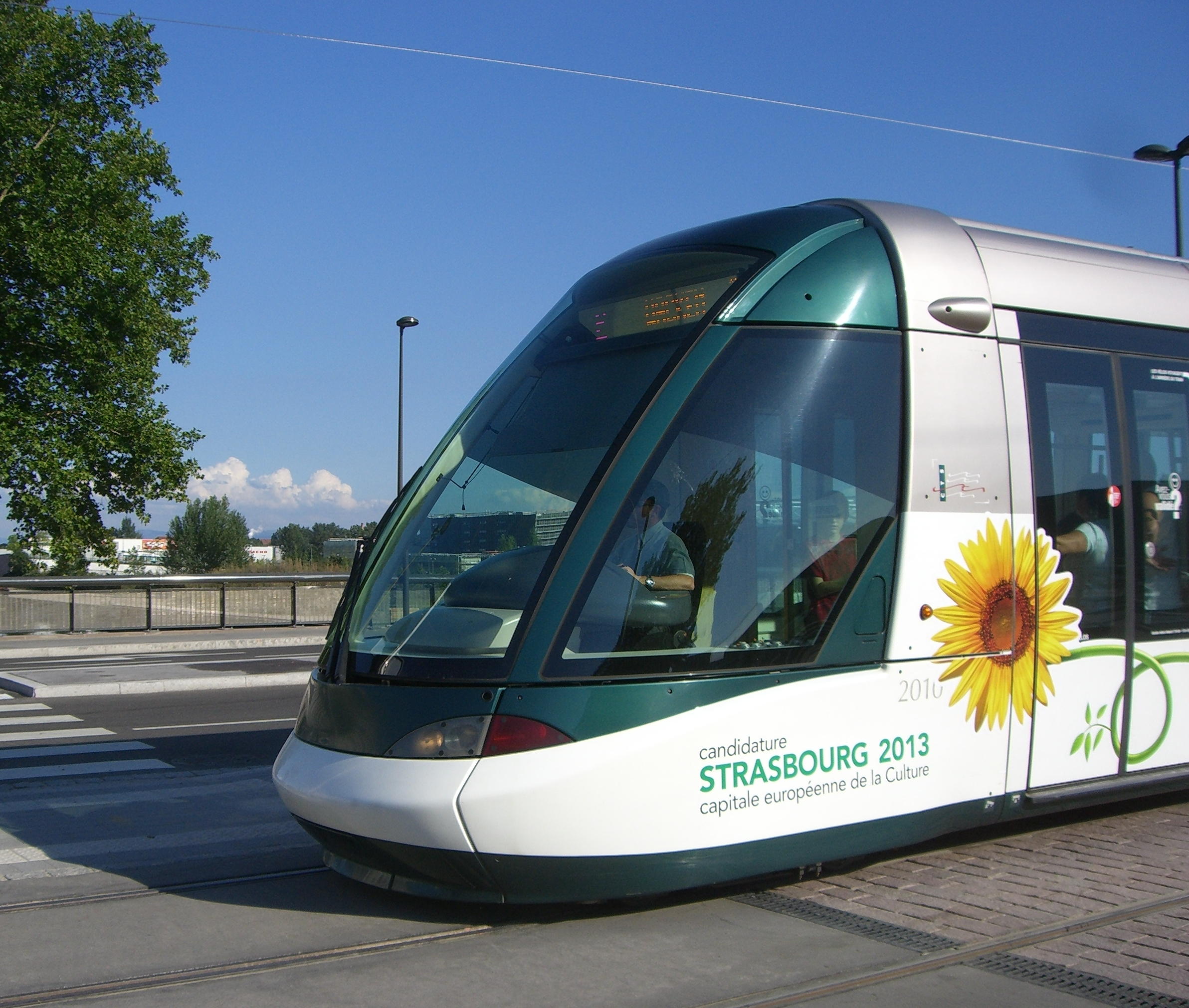 Strasbourg - Straßenbahn - 1. Fahrzeuggeneration - Frontpartie.jpg